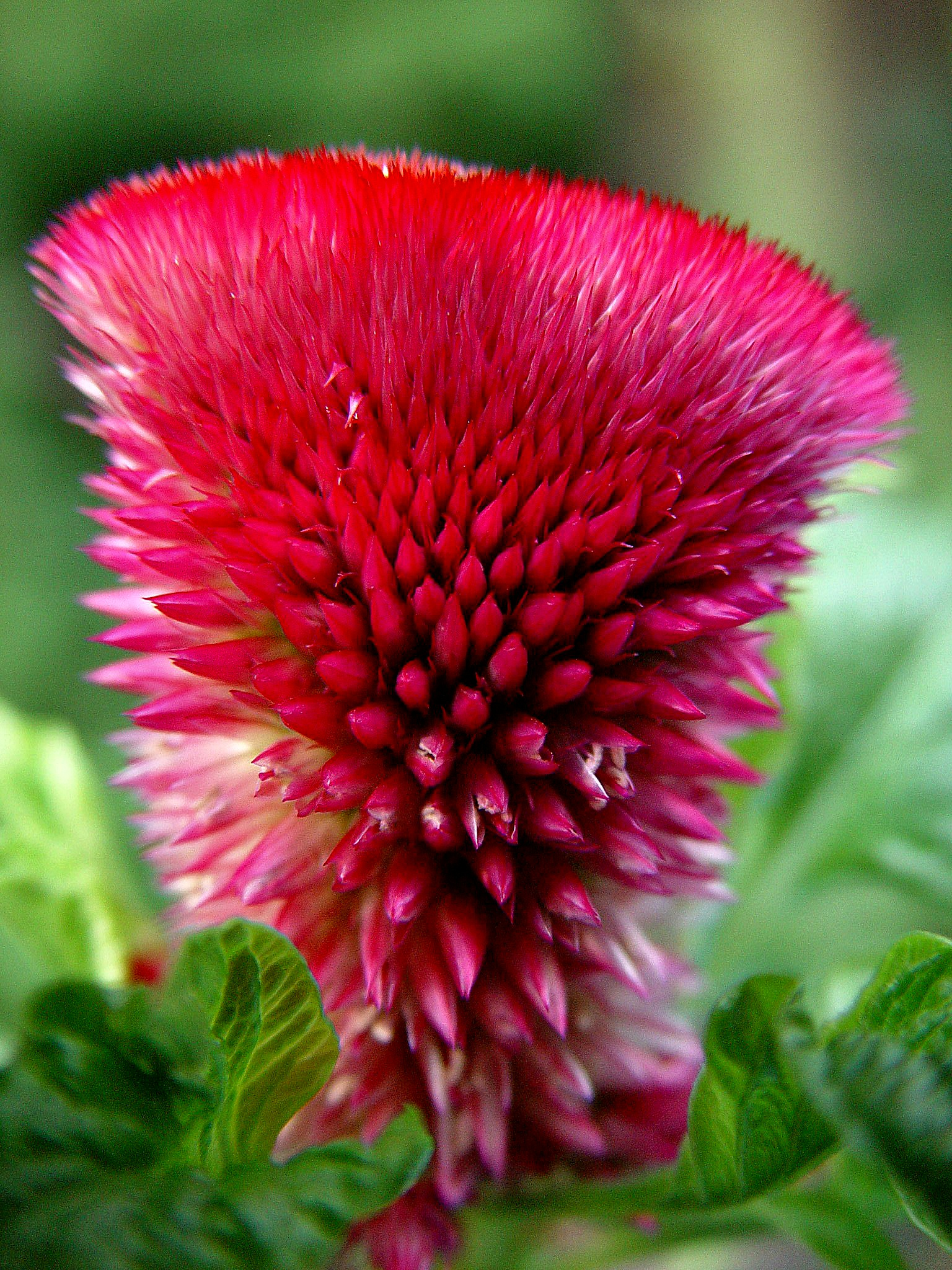 C. argentea var. plumosa. Hornjoserbsce: C. argentea var. plumosa.